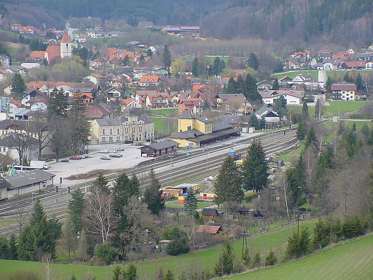 Bahnhof Aspang der Aspangbahn von oben